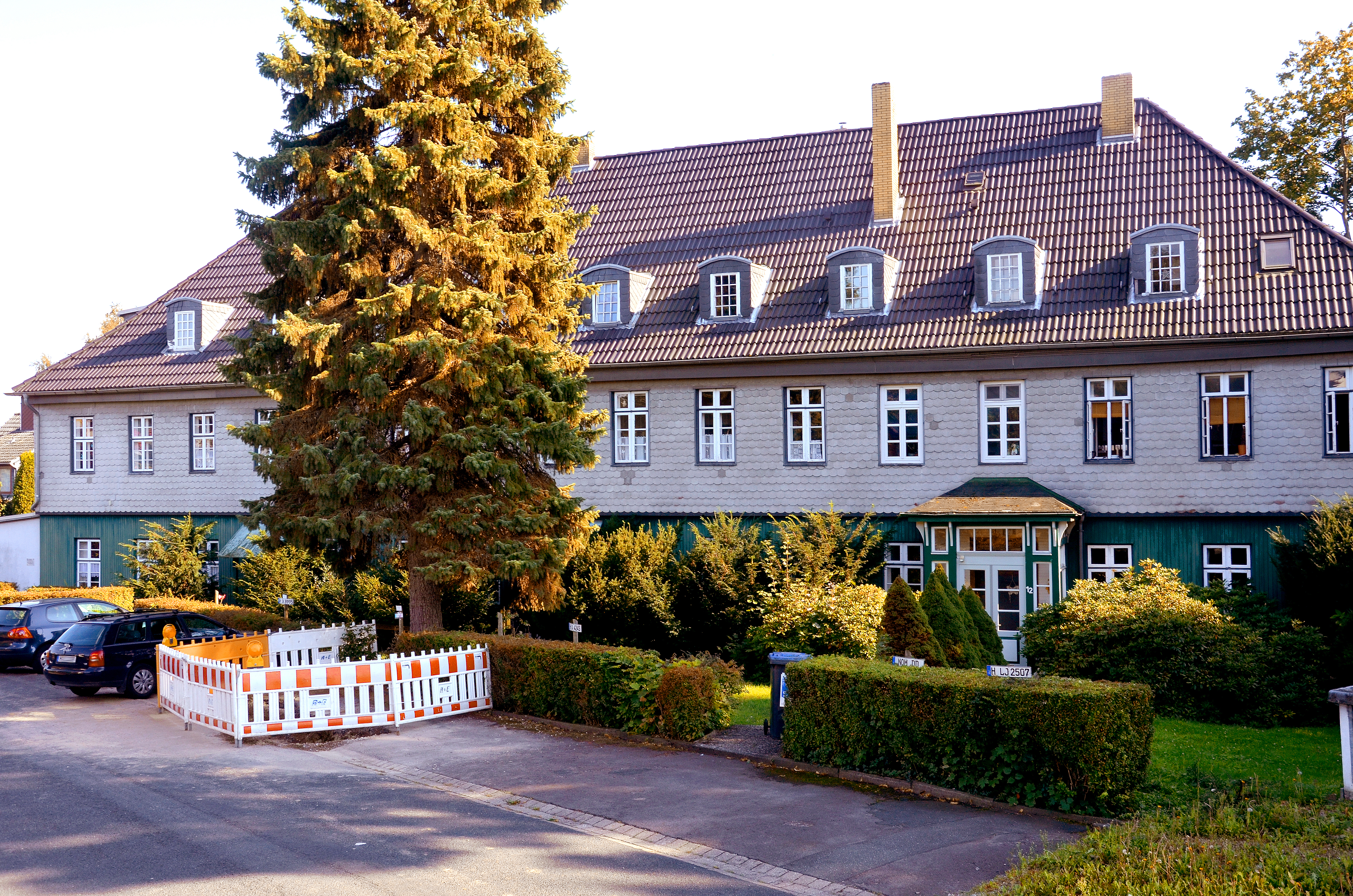 Das umgebaute, ehemalige Herrenhaus der Untergut-Linie der Familie von Wedemeyer in Eldagsen ...